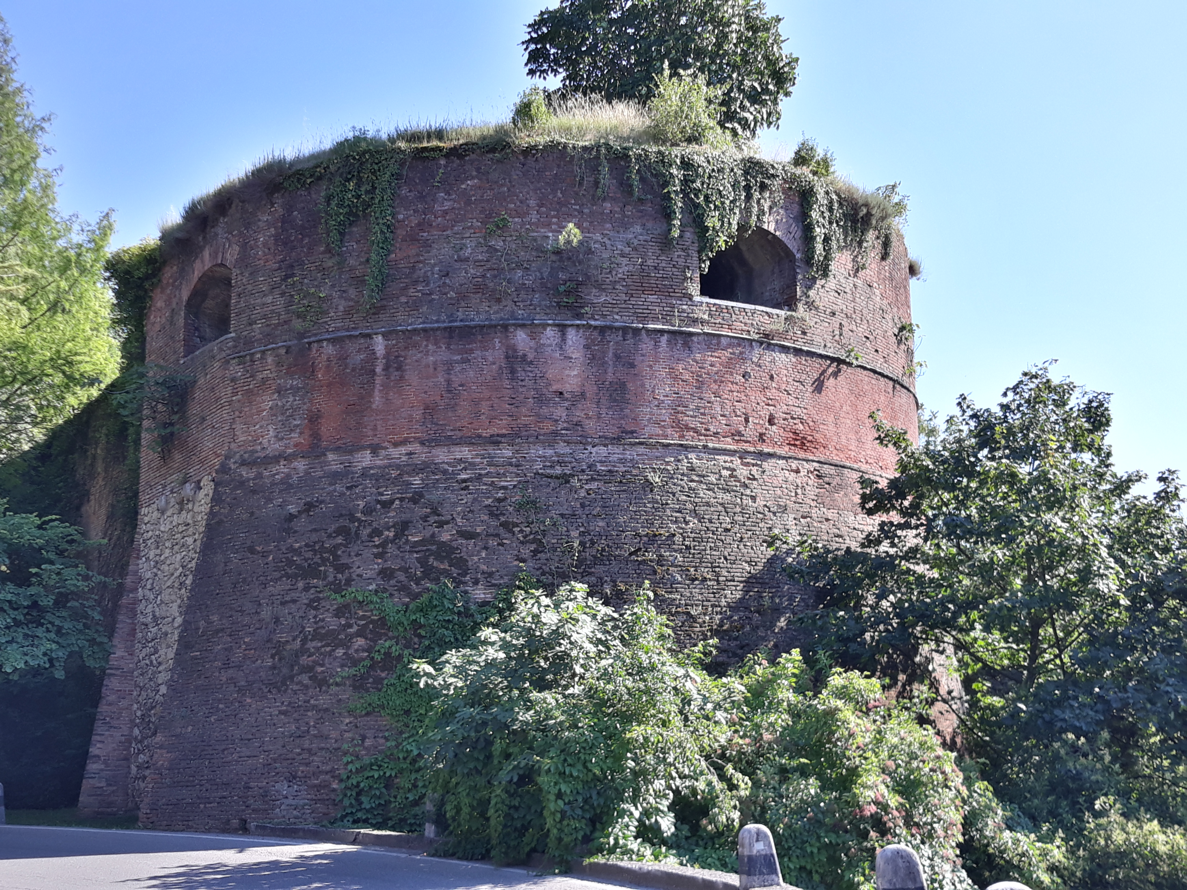 Rondella della Bacola - mura di Verona